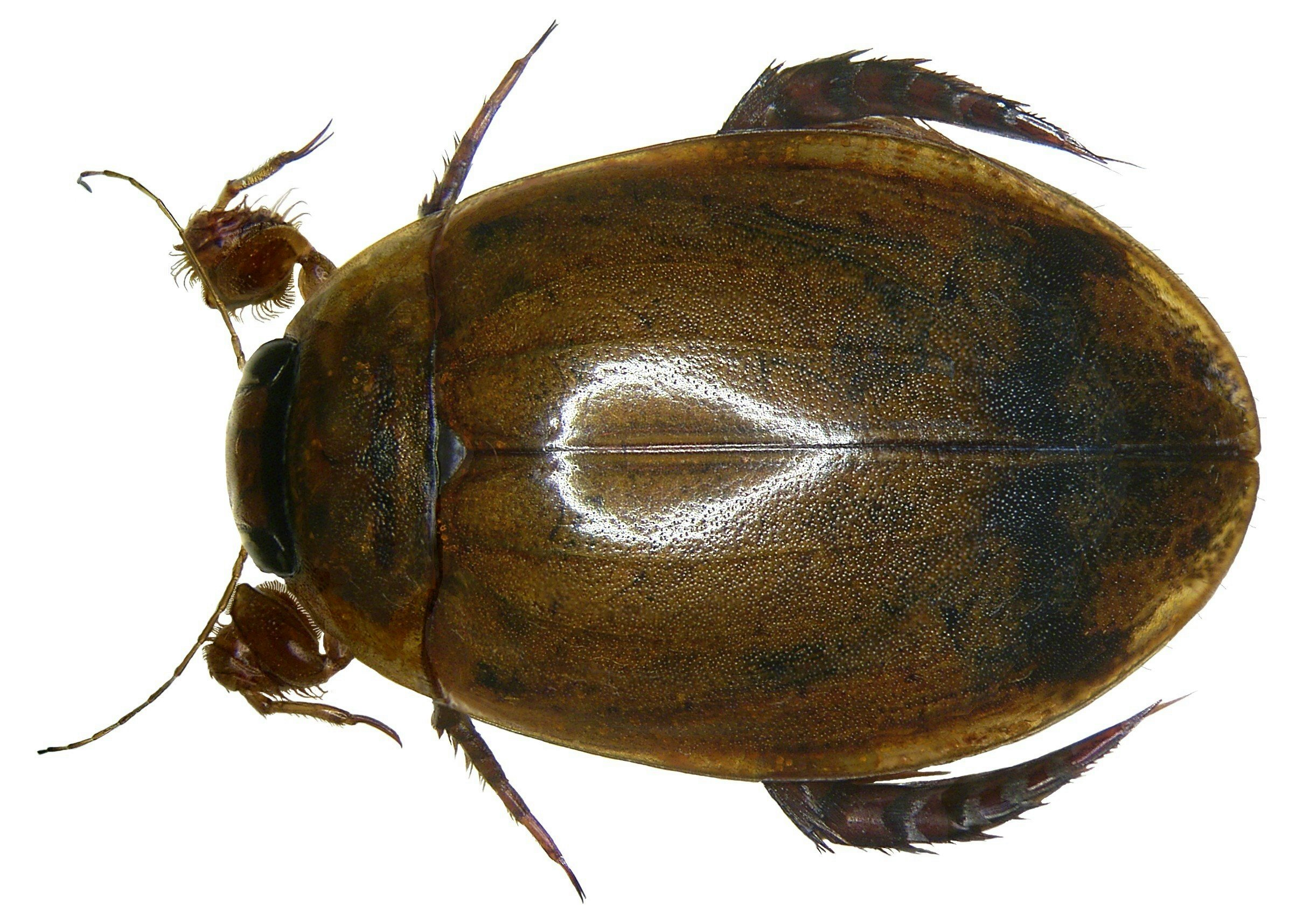 Acilius sinensis Peschet, 1915 male Familie: Dytiscidae Grösse: 15 mm Fundort: China, Süd-Yunnan, Dehong Dai leg. D.Wase, 2007; det. L.Hendrich, 2008 Foto: U.Schmidt, 2008